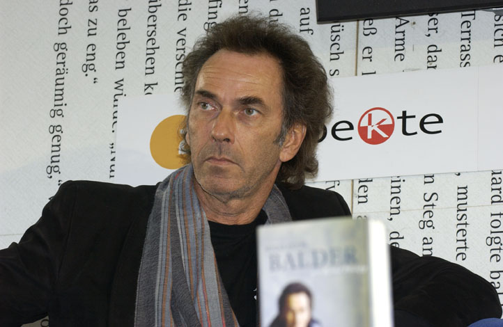 Dieses Fotos dürfen Sie honorarfrei nutzen, wenn Sie folgenden credit beachten: Copyright: Das blaue Sofa / Club Bertelsmann.